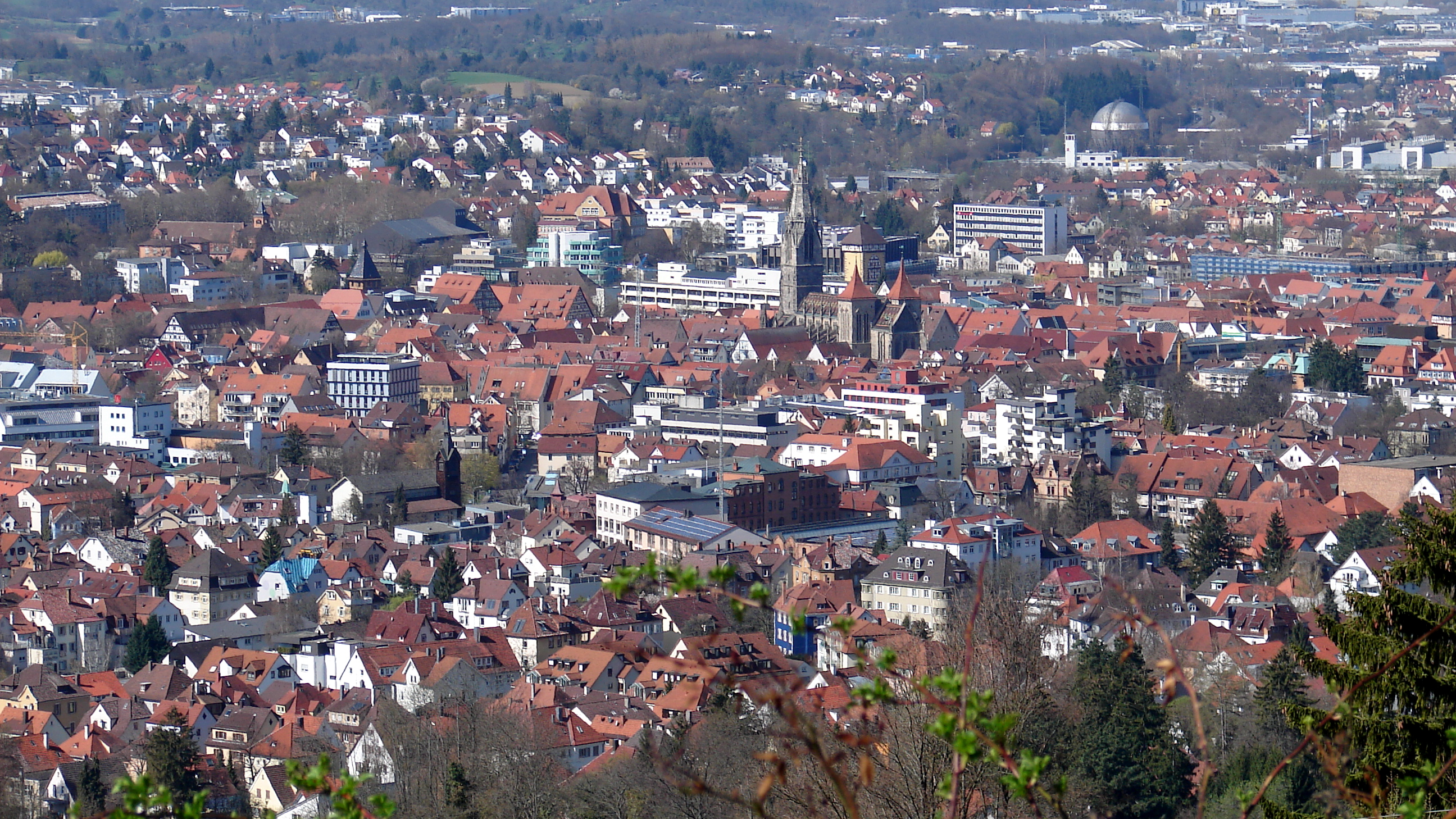 Die Achalm (707,1 m ü. NHN) der „Hausberg“ der Stadt Reutlingen, Baden-Württemberg ist ein Zeugenberg des nördlichen Vorlandes der mittleren Schwäbischen Alb in Südwestdeutschland.